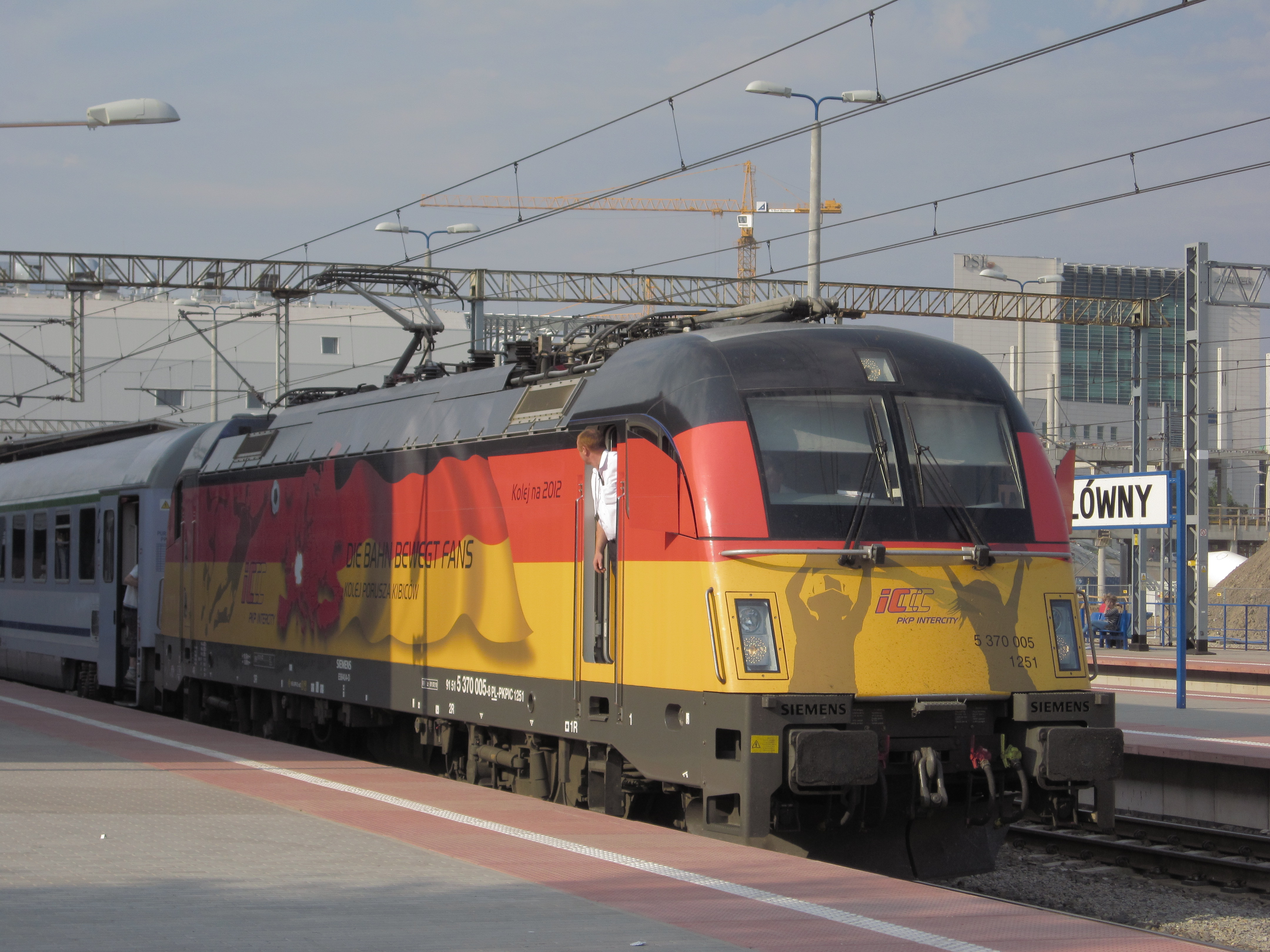 Lokomotywa EU44 oklejona w barwy Niemiec na czas trwania EURO 2012.